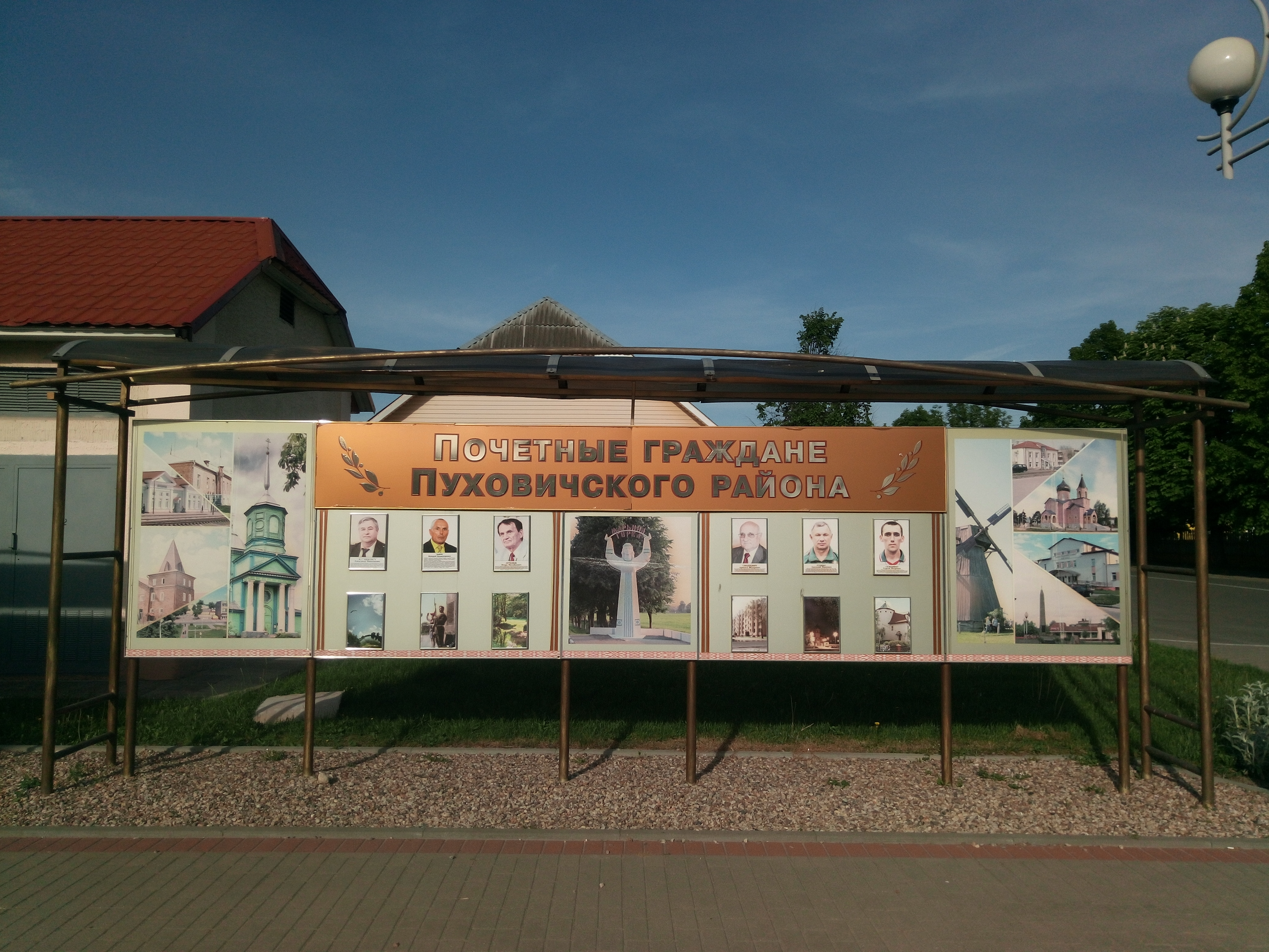 Ганаровыя грамадзяне Пухавіцкага раёна